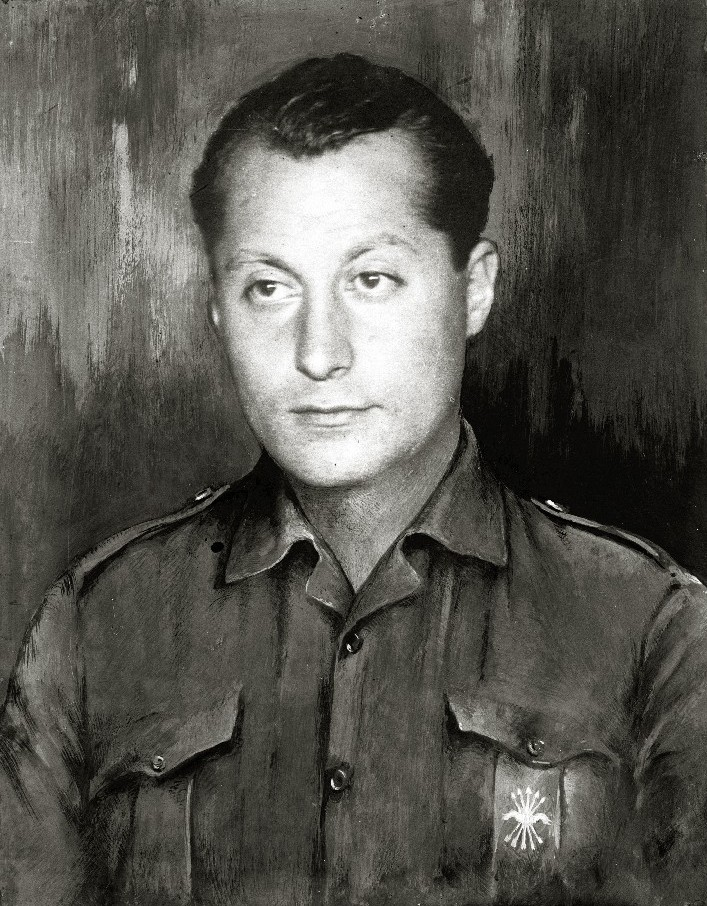 Negativo en blanco y negro. Gelatino Bromuro.